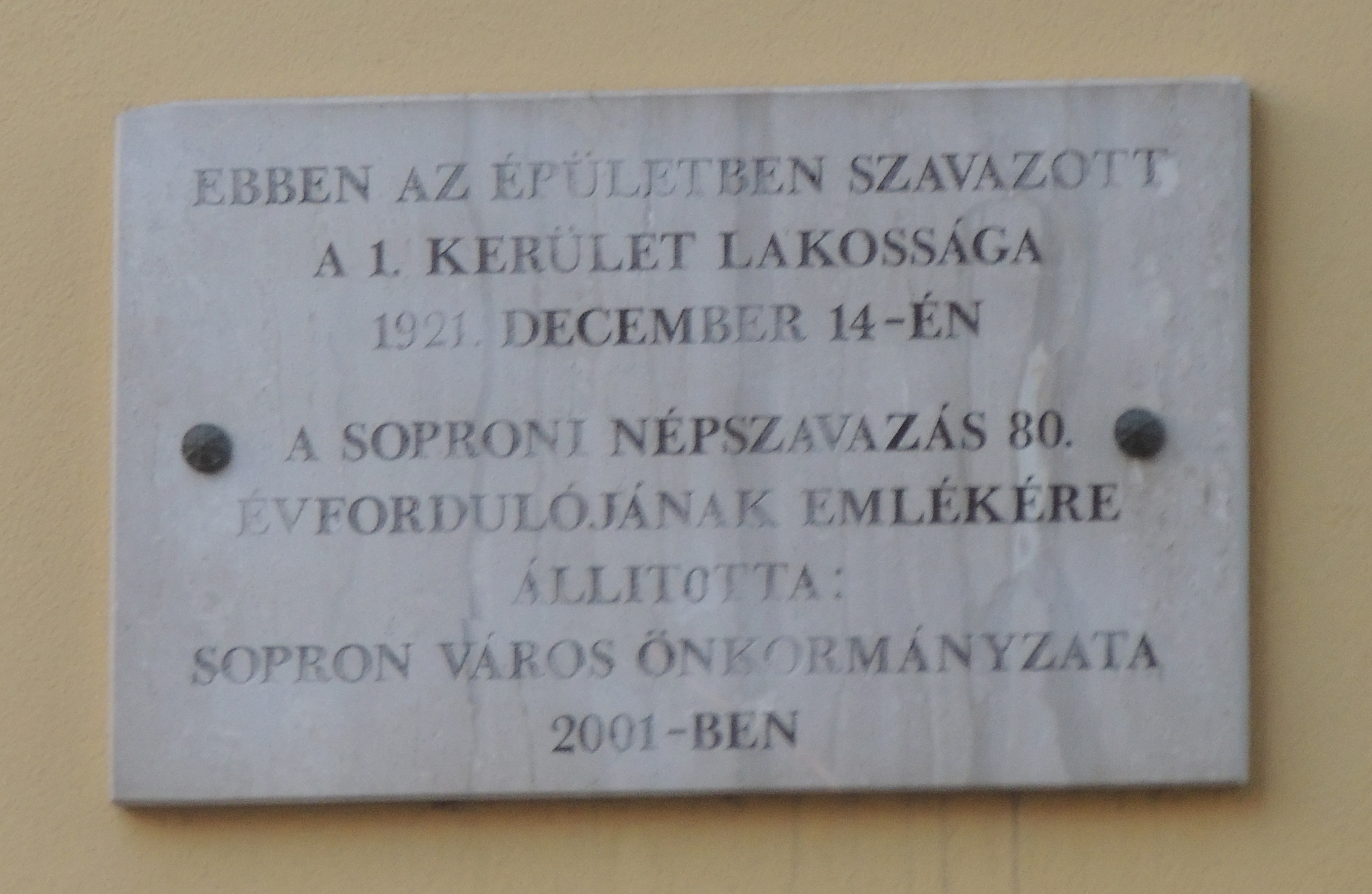 A soproni népszavazás 80. évfordulójára állított emléktábla Sopronban.